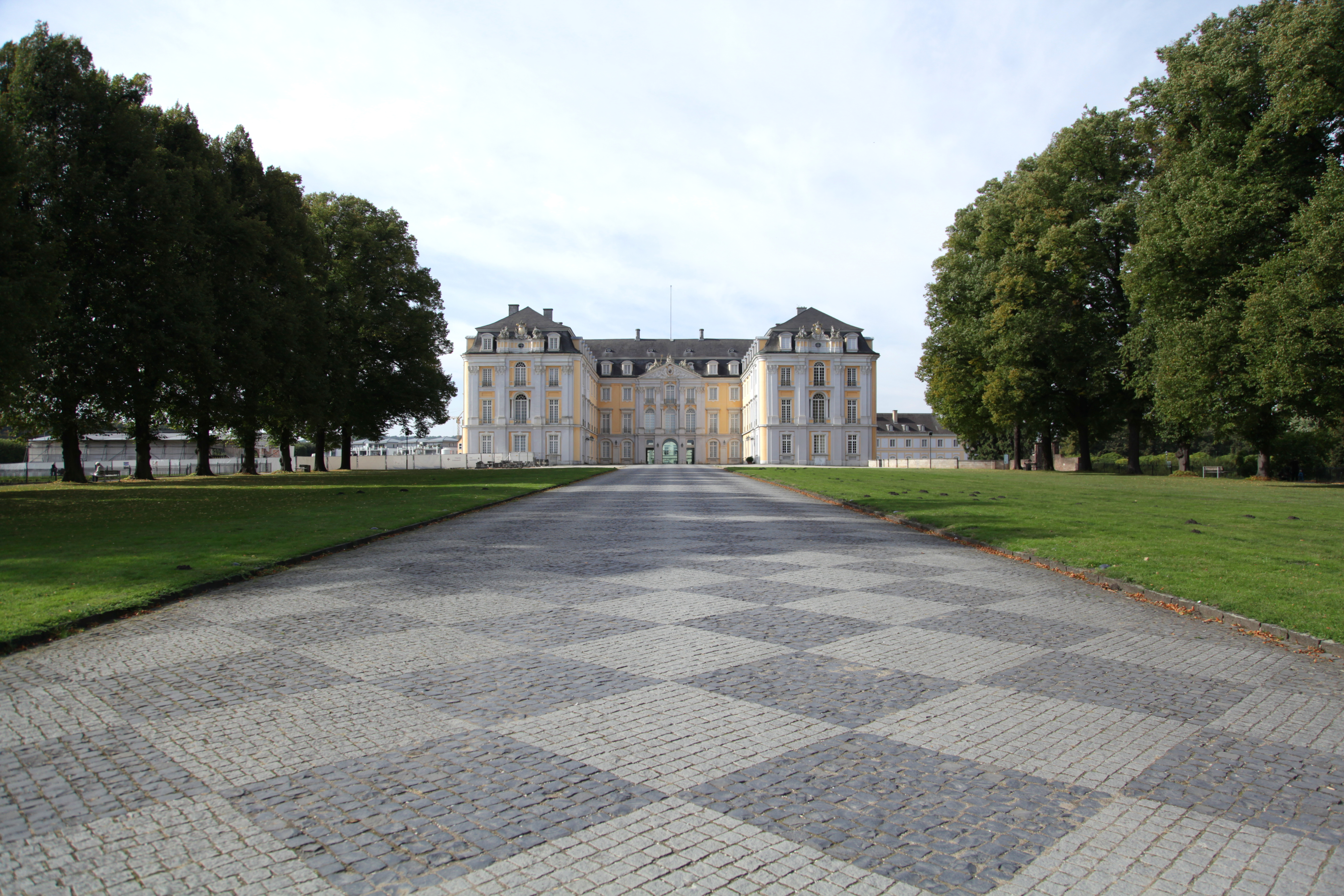 Innere Promenade im Schlosspark vor Schloss Augustusburg in Brühl (Rheinland)